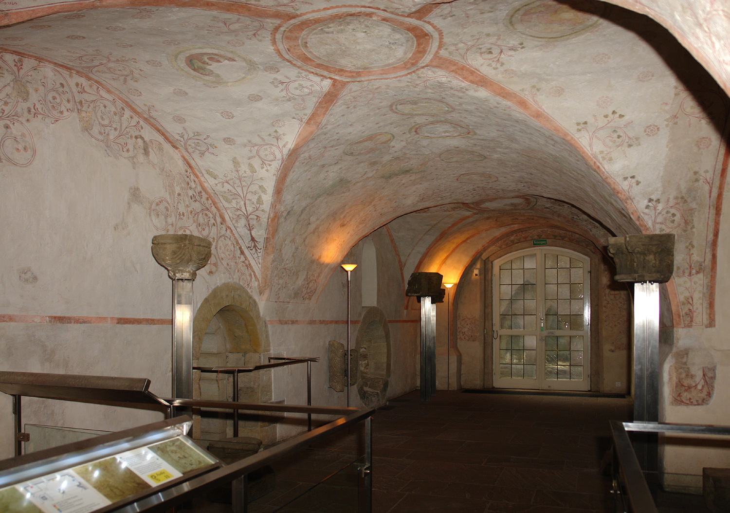 Gotische Wandmalereien (um 1414) im Bremer Dom (Museum)